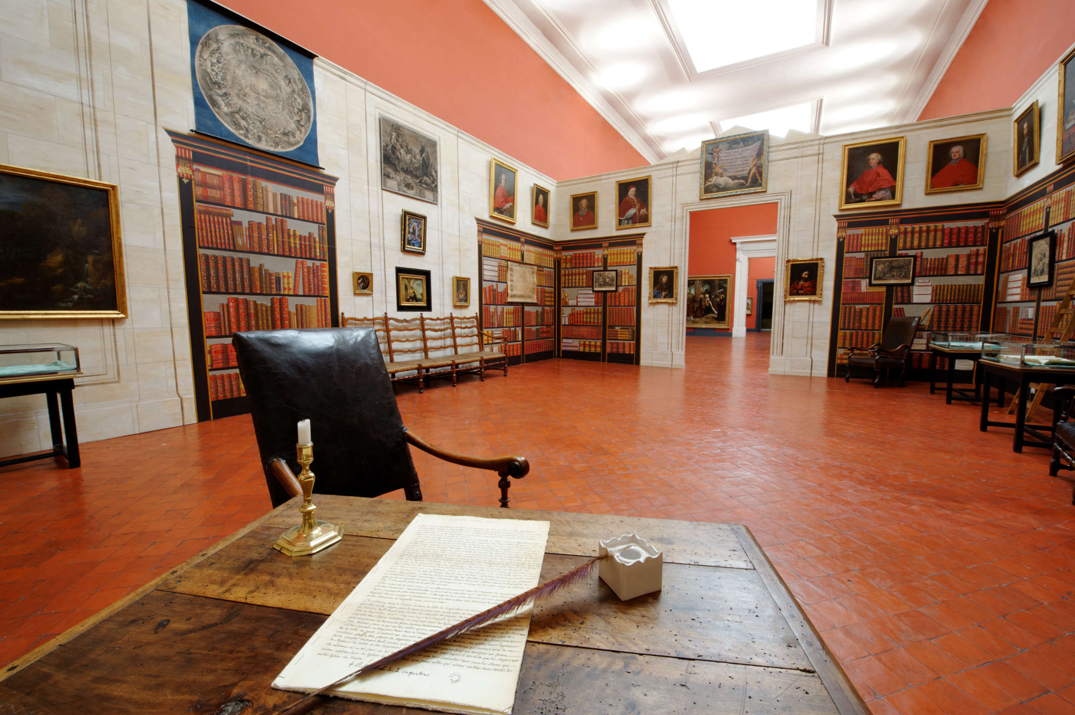 Musées des beaux-arts, trompe-l'oeil, musée Duplessis-Comtadin